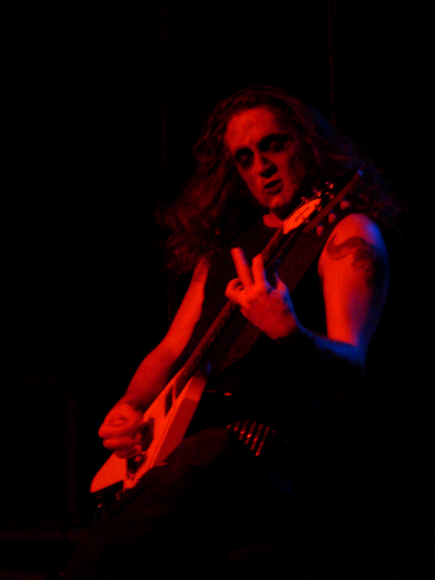 Marduk en concert à l'Elysée-Monmartre, Paris, le 2/12/2007. Morgan Steinmeyer Håkansson